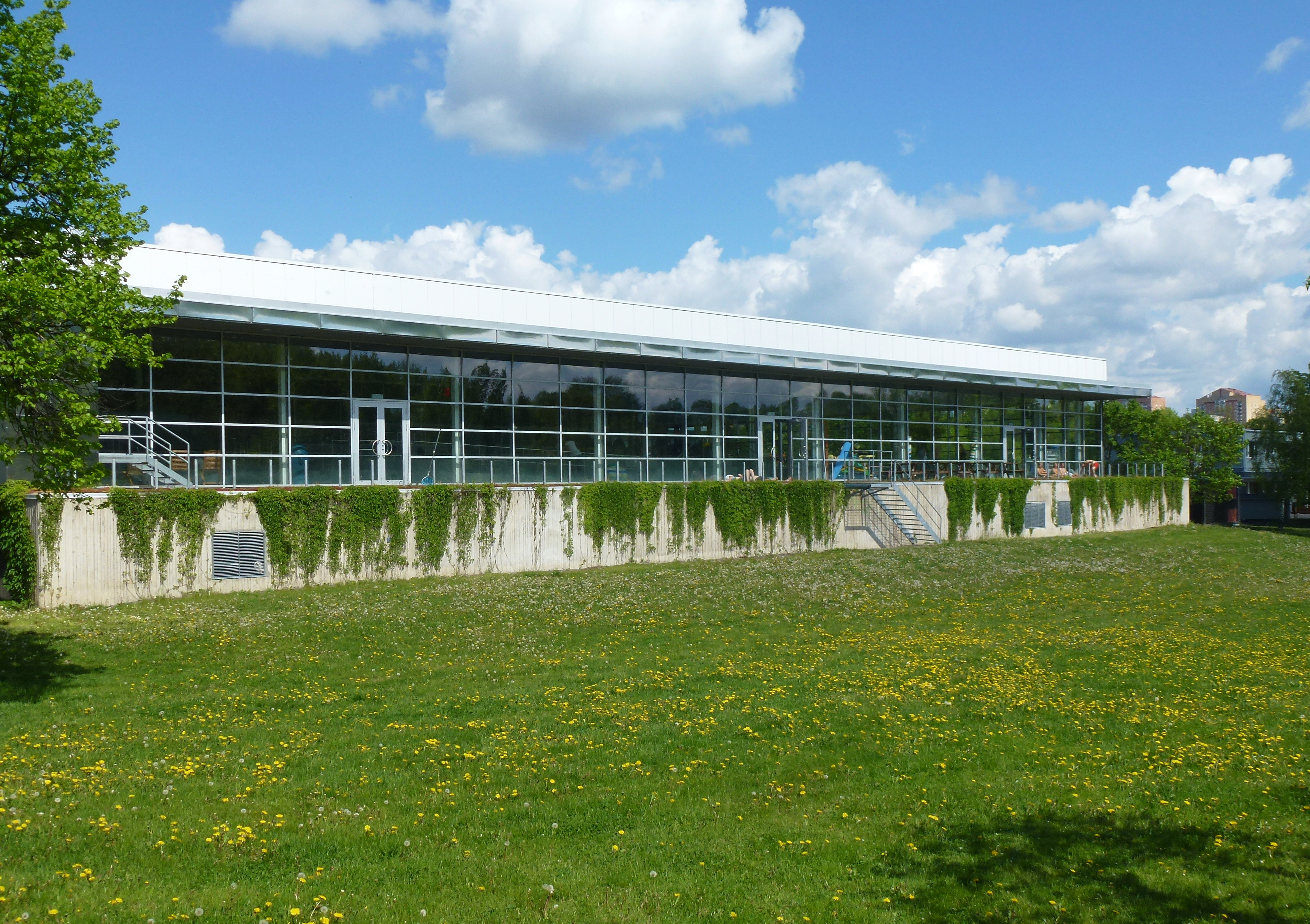 Sollentuna sim- och sporthall